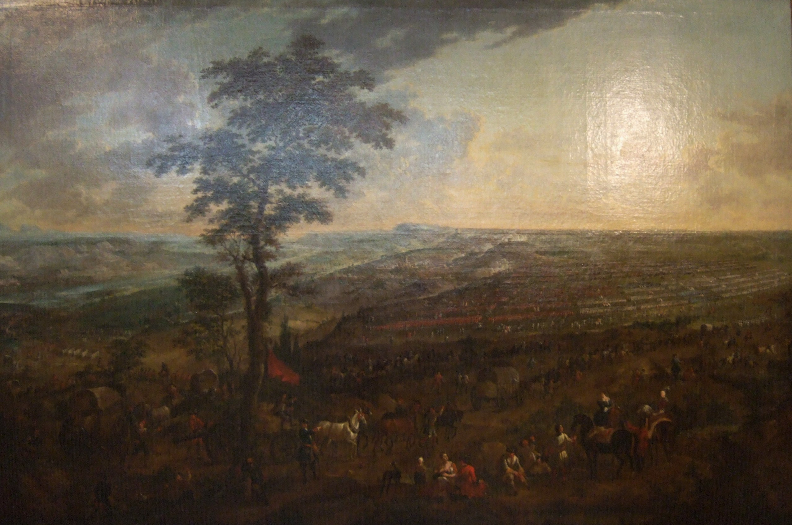 Die Schlacht bei Almenara am 27. Juni 1710